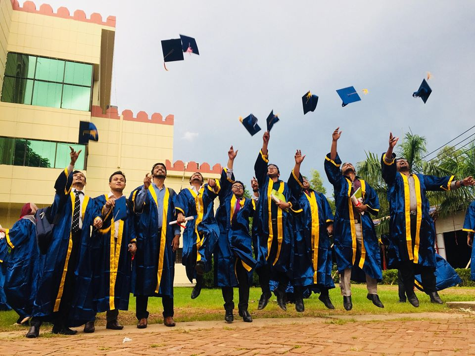 Convocation photo